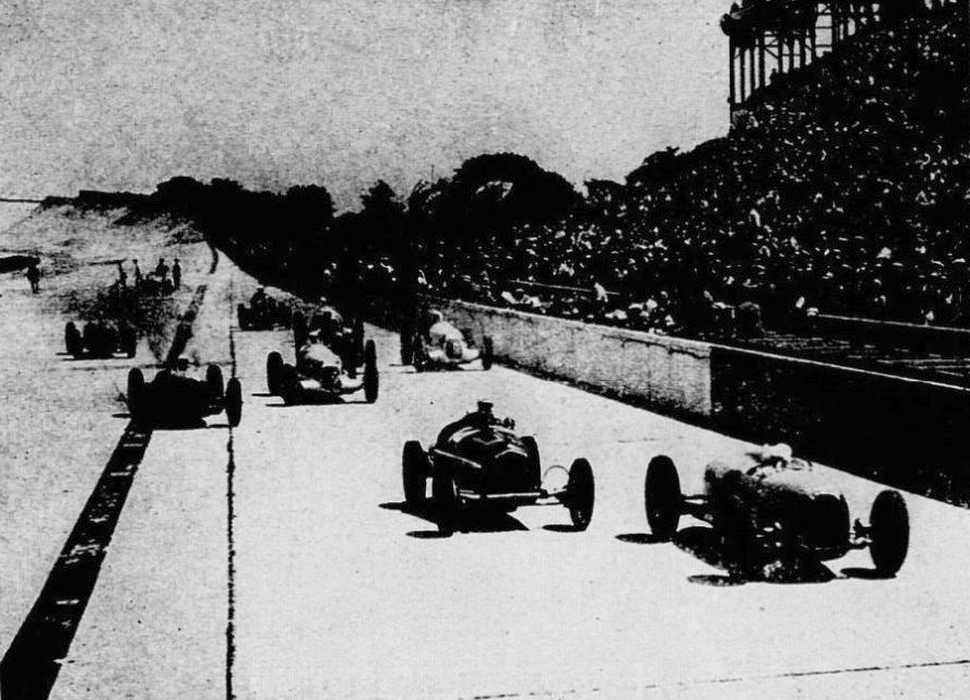 Départ du Grand Prix de l'A.C.F. 1935 à Montlhéry (de G à D Stuck, Nuvolari, Caracciola, et Viarzi).